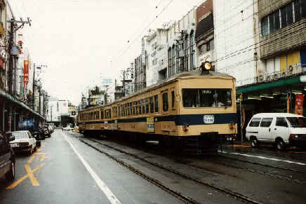 Interurbain de la compagnie Fukutetsu, dans la rue en face de la gare de Fukui, île de Honshu, Japon Photo Eric Binamé, en 1995